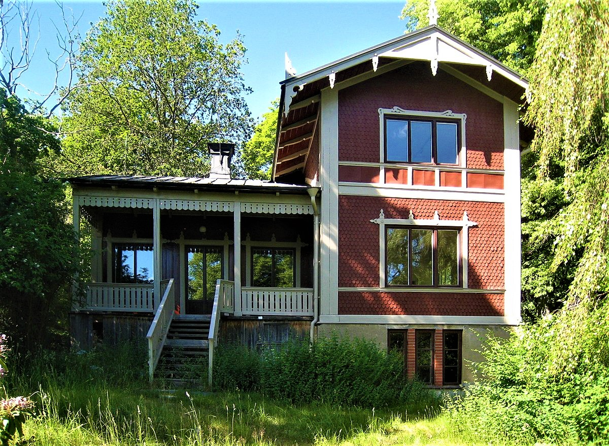 Sjövillan, som ligger nedanför Ljunglöfska slottet i Blackebergs gårds område, Blackeberg, Bromma. Vy från söder.